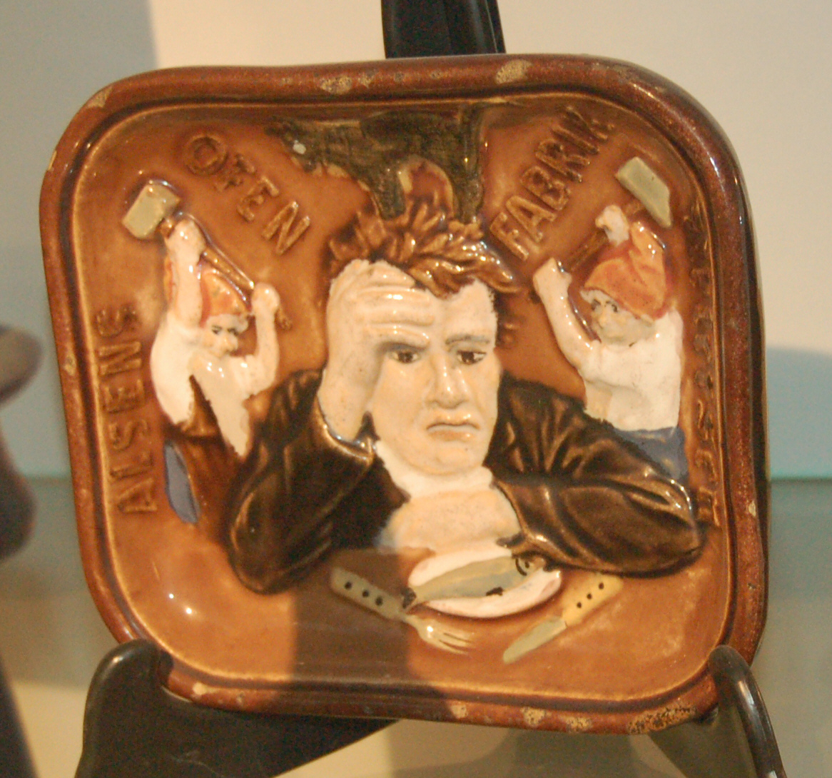 Aschenbecher "Das Katerfrühstück" der ehemaligen Alsenlischen Zementfabrik in Uetersen um 1870.